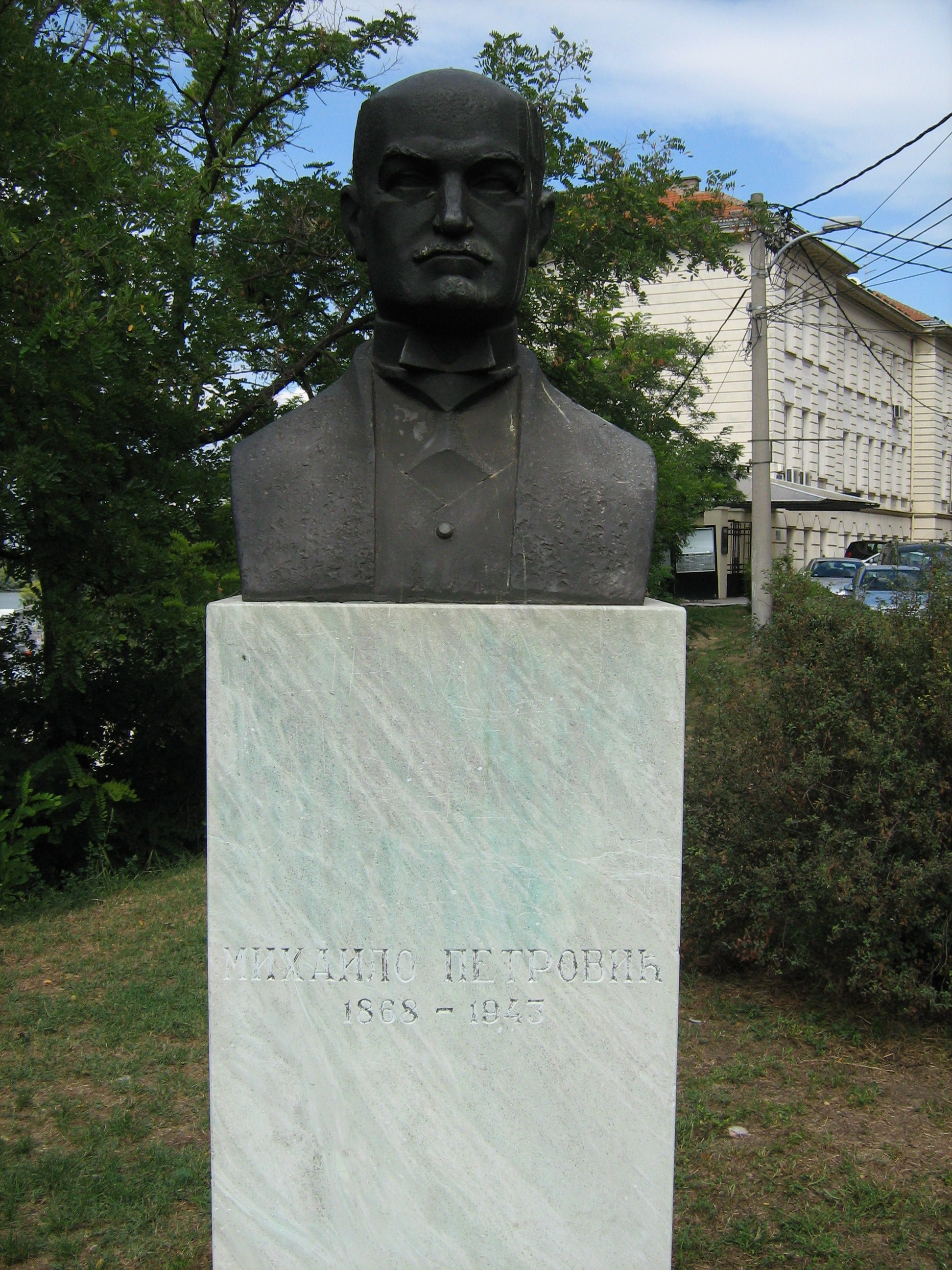 Кућа Мике Аласа - биста испред куће